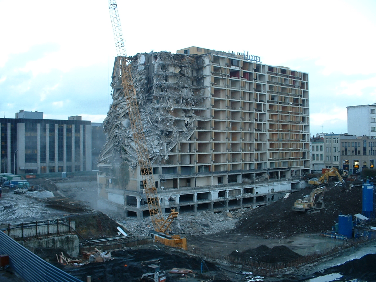 Afbraak van het Switel hotel te Antwerpen